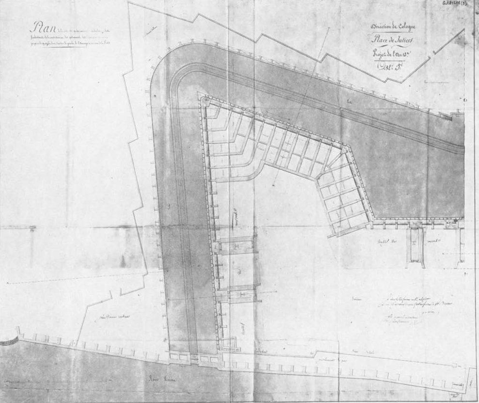 Plan of Brueckenkopf Juelich in Germany. Teil einer Bastion des Brückenkopfes Jülich, technische Zeichnung um 1800.